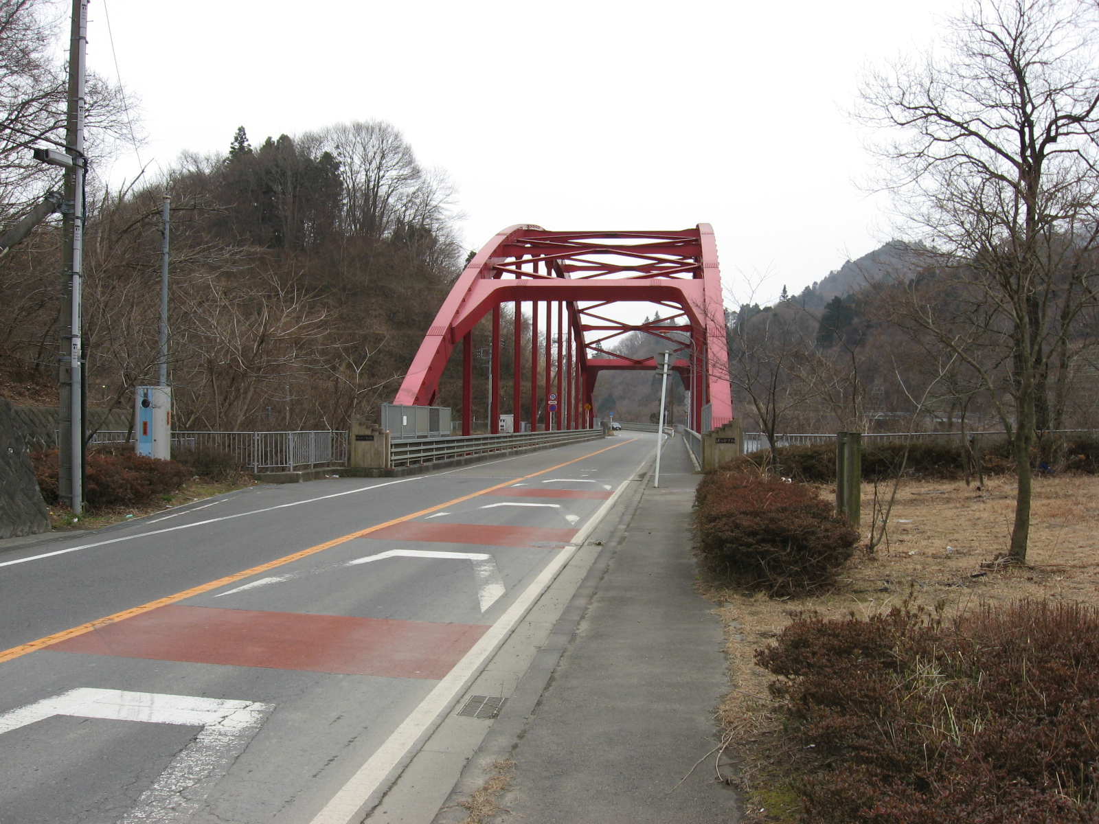 宮ヶ瀬湖上に架かる仏果沢橋